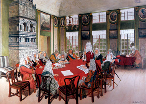 Картины по русской истории. Д.Н. Кардовский. Заседание Сената петровских времен - 1908